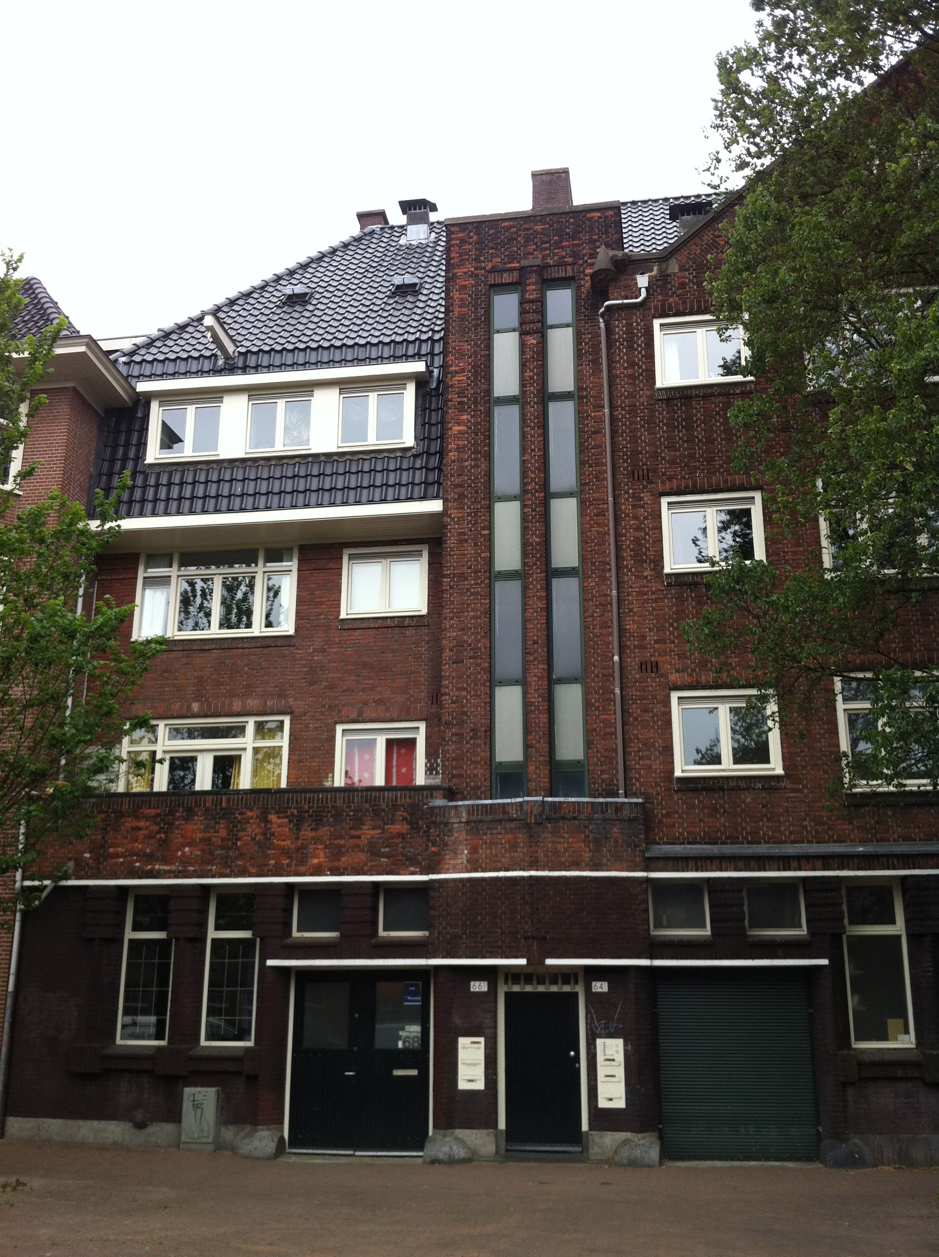 Nieuwe Uilenburgerstraat 66, Amsterdam. Gebouwd door gemeente Amsterdam, Voltooid in 1927, overgedragen aan Bouwfonds Handwerkers Vriendenkring. Tegenwoordig sociale huurwoningen verhuurd door woningcorporatie Ymere.